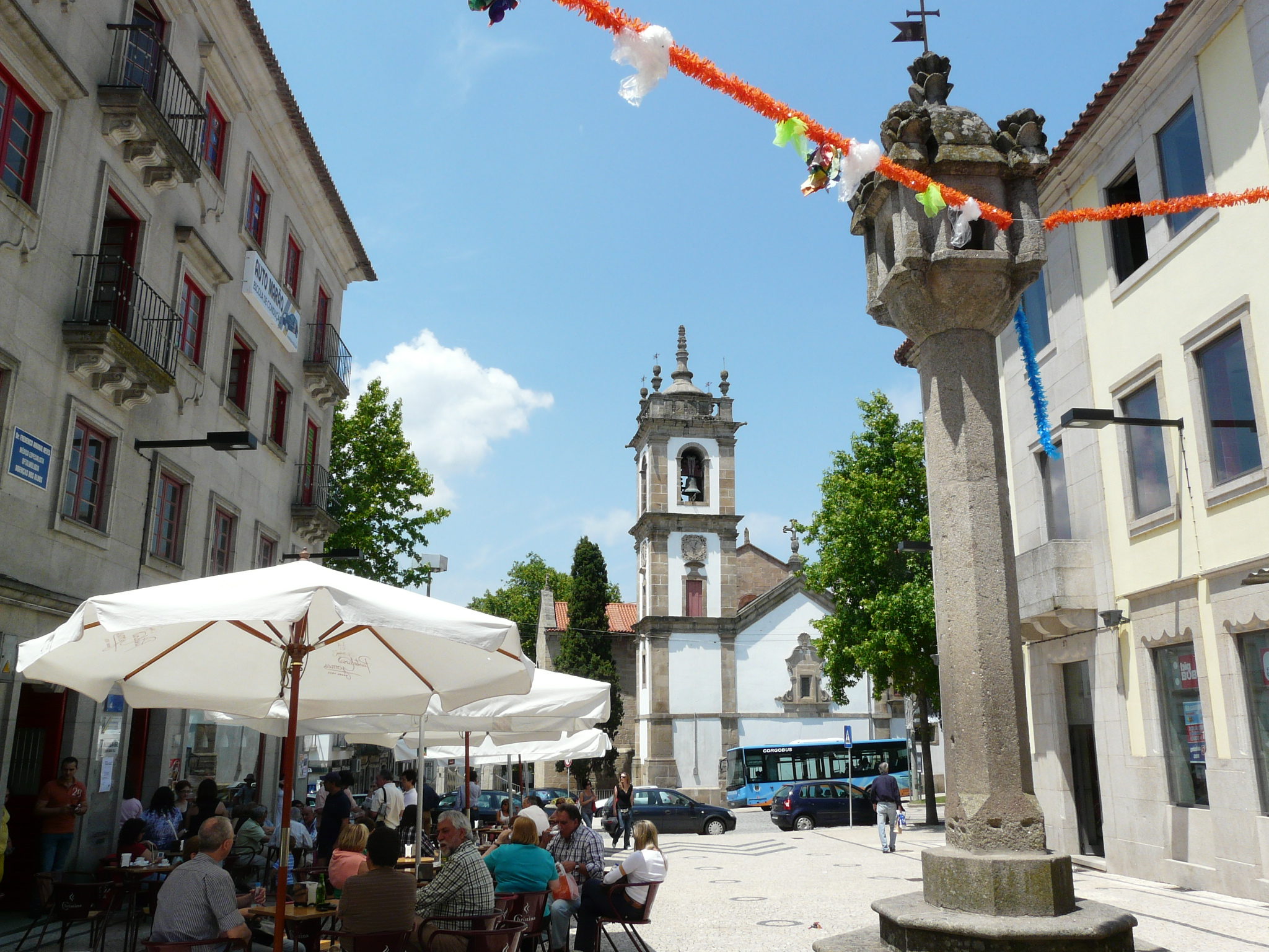 Square at Vila Real